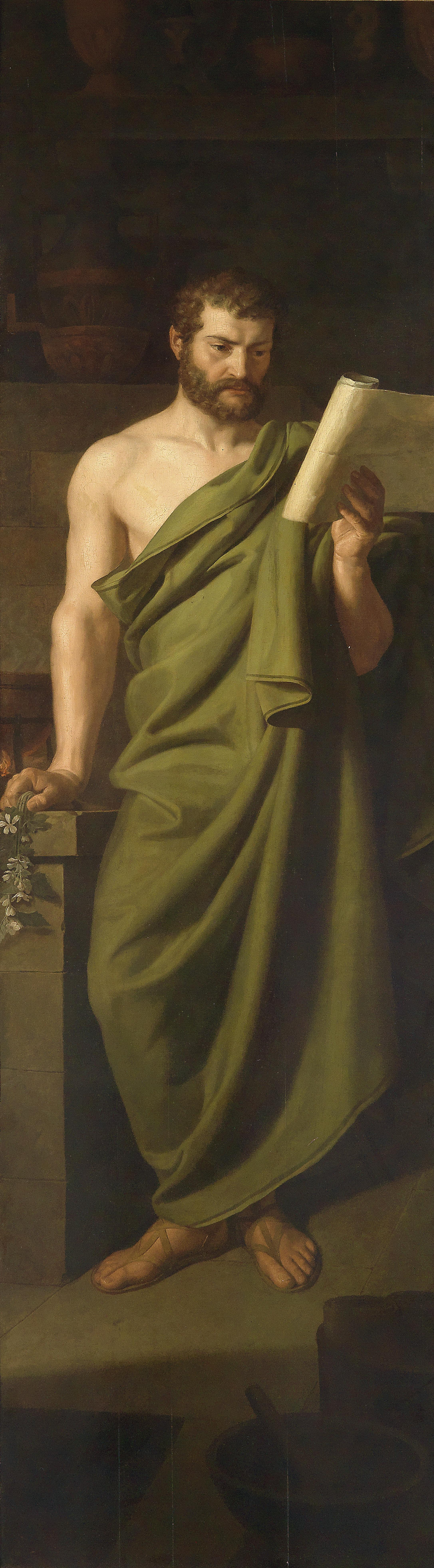 eines von vier Ladenschildern für die Apotheke "Zum goldenen Löwen" in der Josefstadt